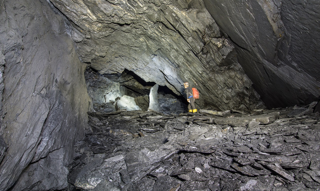 Schieferabbau Findling